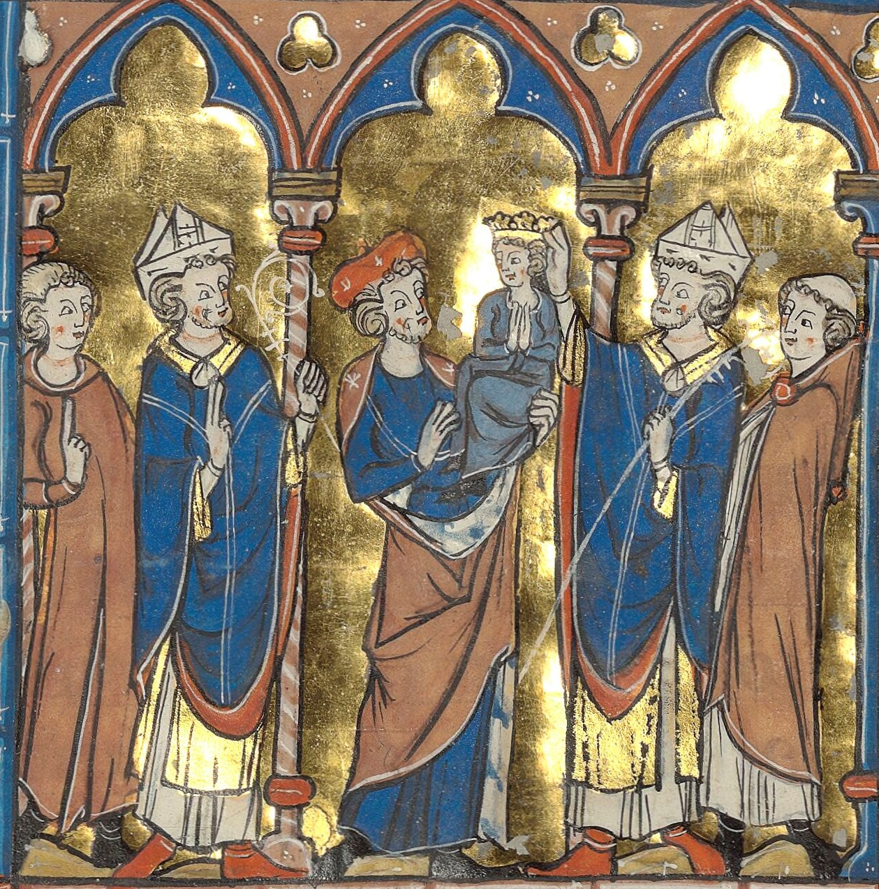 Couronnement de Baudouin V. - Bibliothèque nationale de France, Département des Manuscrits, Division occidentale - Cote : Français 2754 (Guillaume de Tyr, Historia)